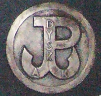 Odznaka oddziału AK "Dysk" (pochodzi z tablicy pamiatkowej umieszczonej w kościele św. Jacka w Warszawie)